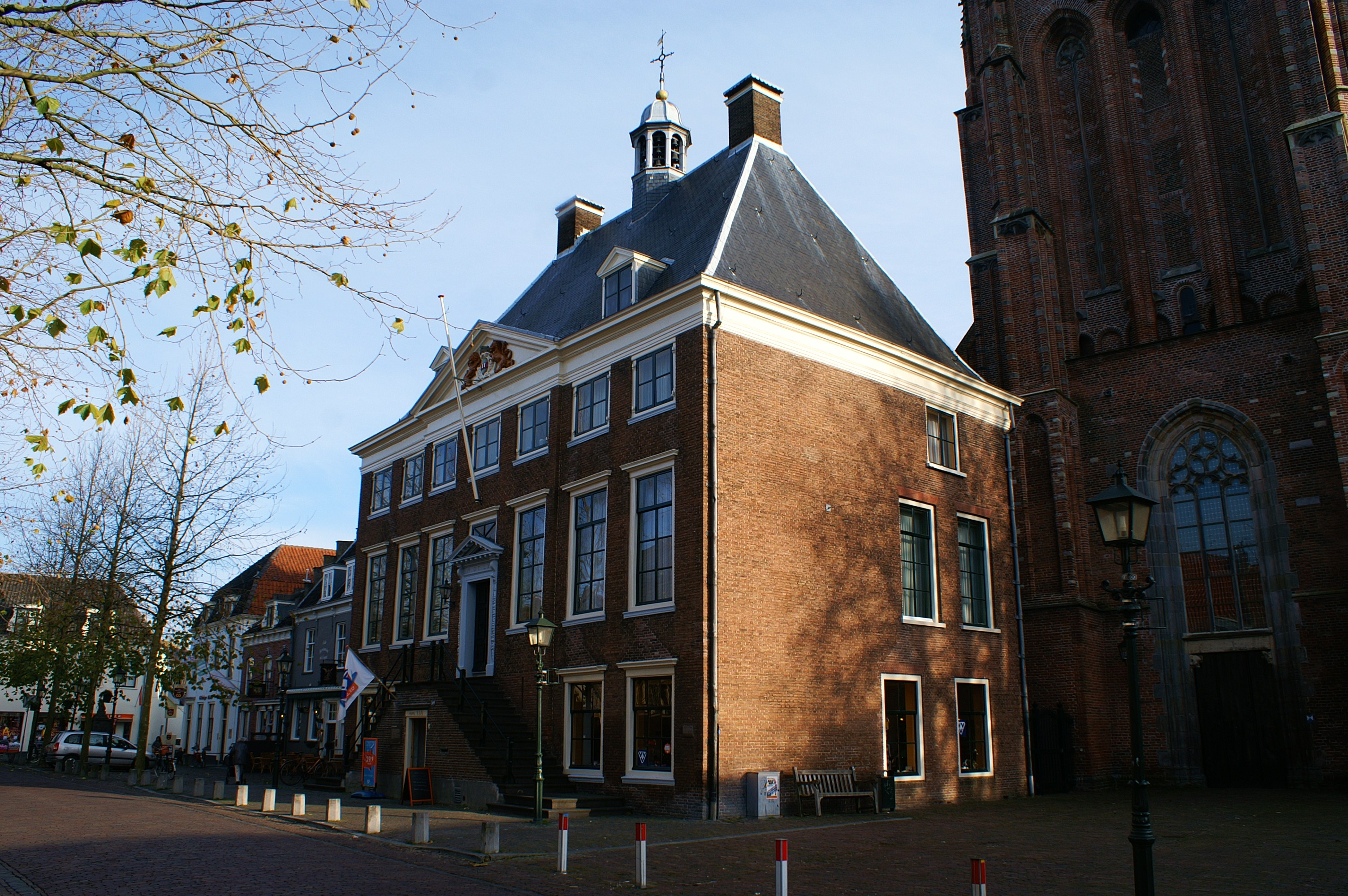 Het voormalige stadhuis van Wijk bij Duurstede.